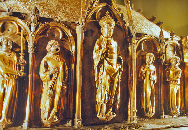 Arqueta de Sant Patllari. Església de Santa Maria de Camprodon. Ripollès